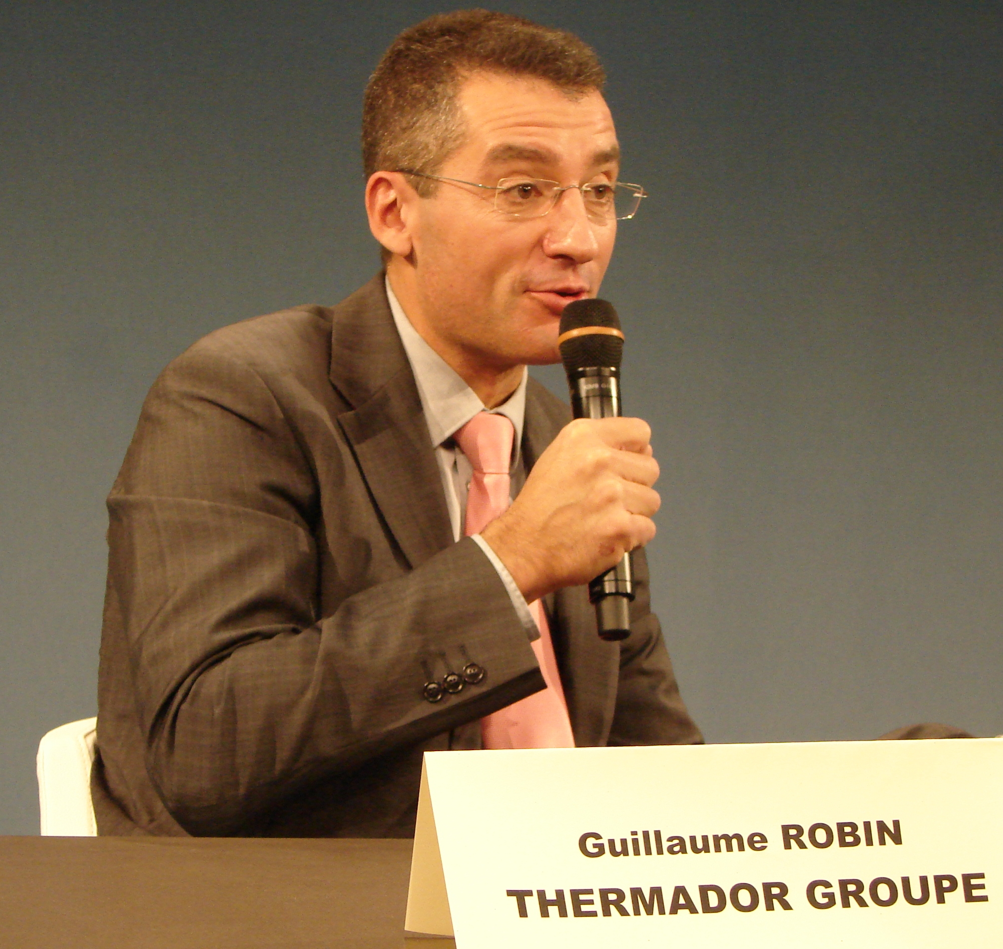 Guillaume Robin, DG de Thermador (entreprise cotée au CAC Mid & Small) lors du salon Actionaria en 2011.